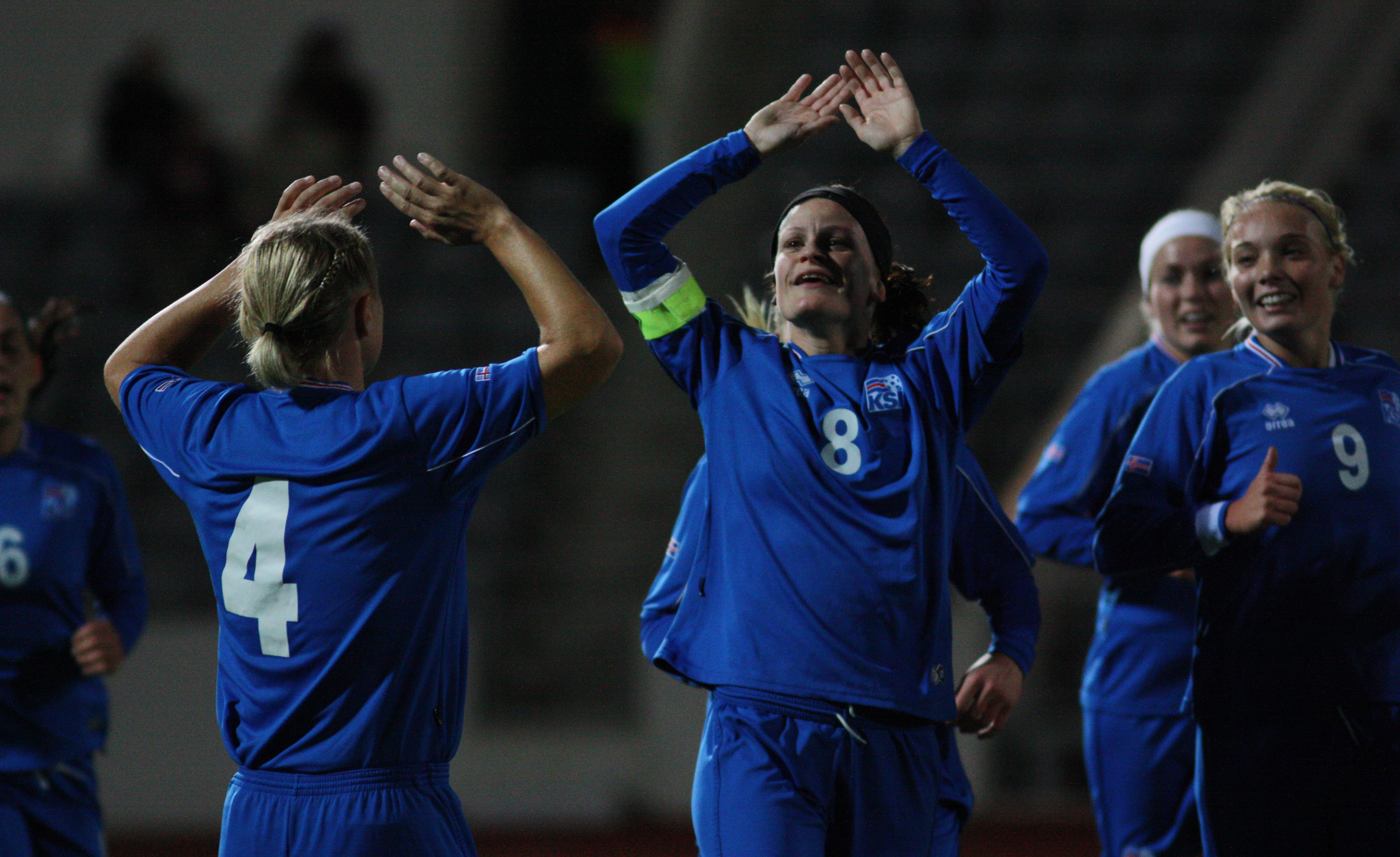 Íslenska knattspyrnulandsliðið vann í kvöld sinn stærsta sigur frá upphafi er liðið lagði Eistland, 12-0, í undankeppni HM 2011.